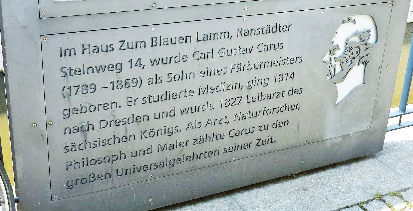 Gedenktafel für Carl Gustav Carus am Ranstädter Steinweg in Leipzig